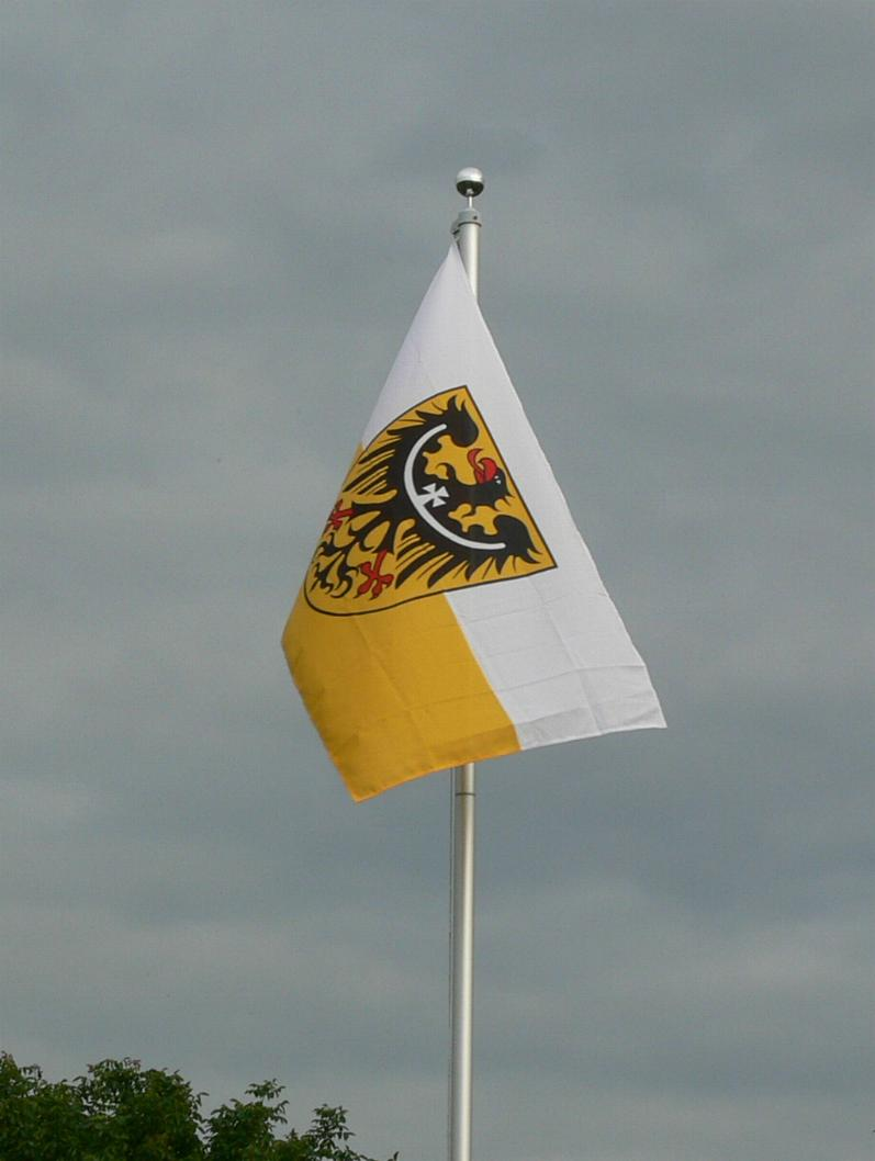 Fahne mit Wappen